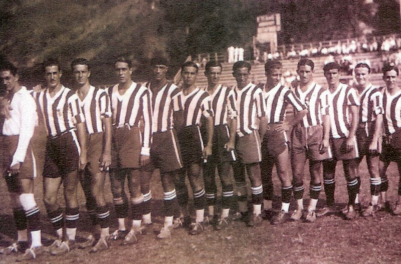 Time do Botafogo no ano de 1932, campeão carioca de futebol.